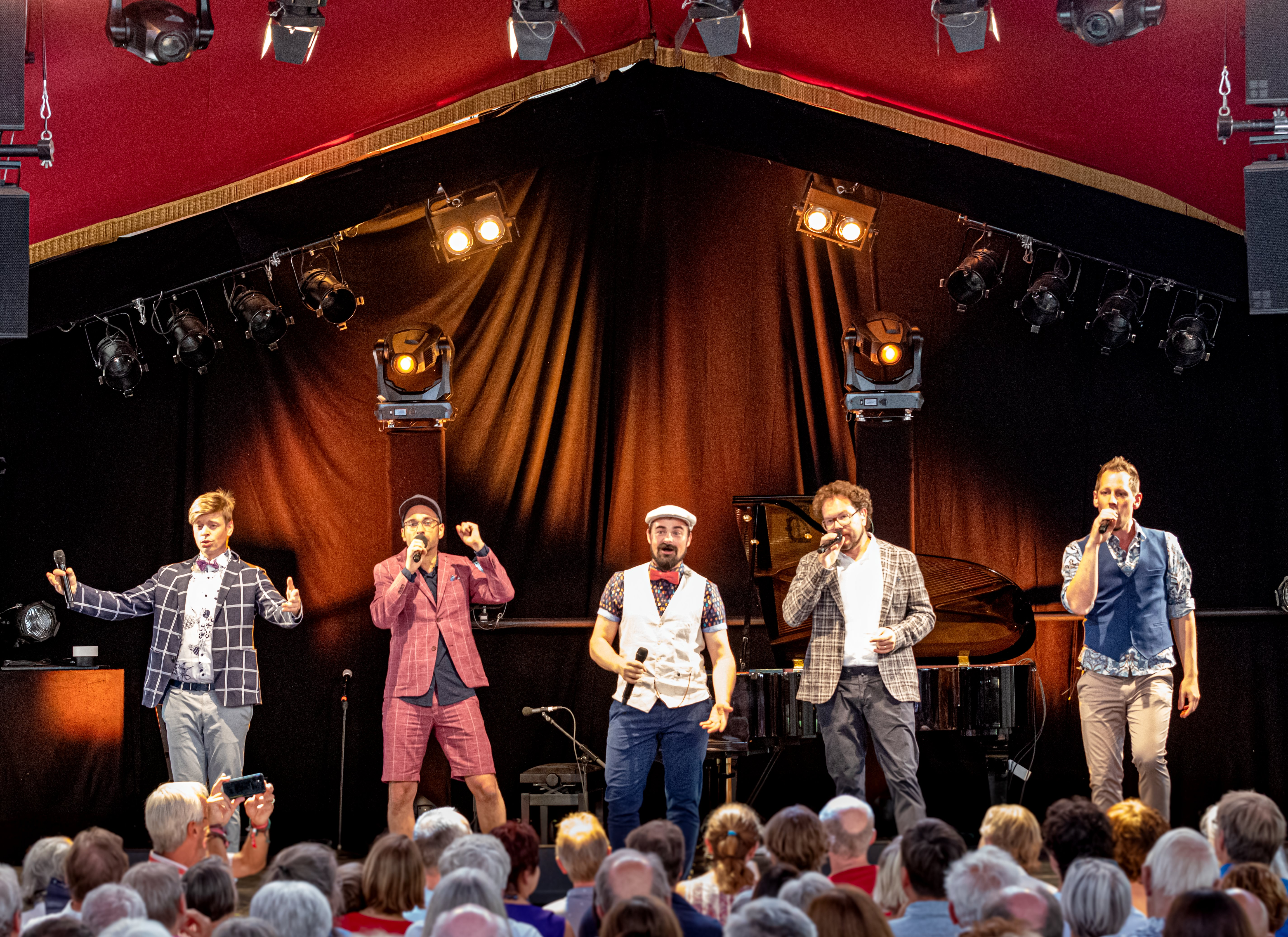 Bilder vom Zelt Musik Festival 2019 in Freiburg im Breisgau Hier die Matinee "Die_kleine_Fiesta"